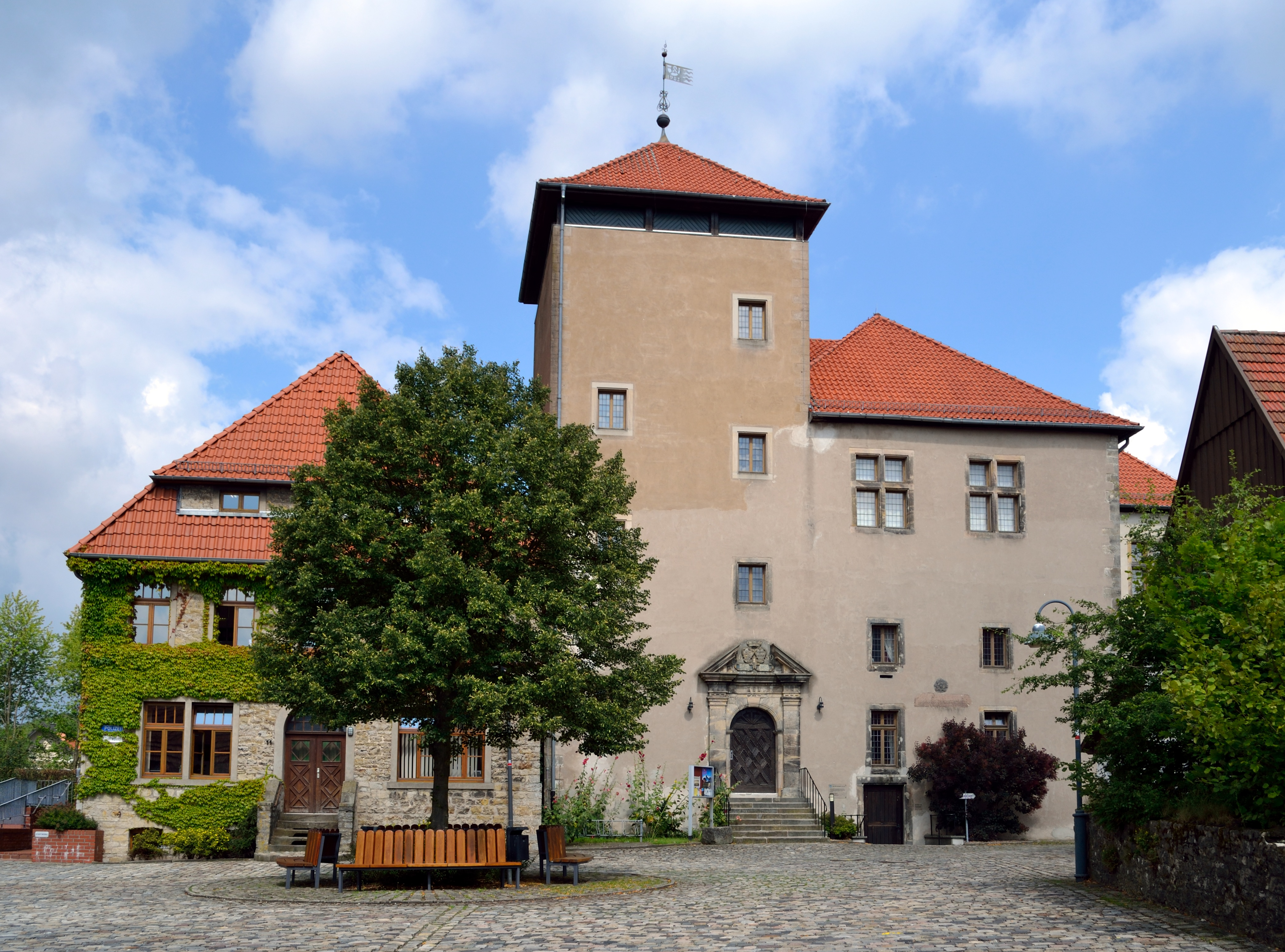 This is a photograph of an architectural monument. .27 Burg Horn